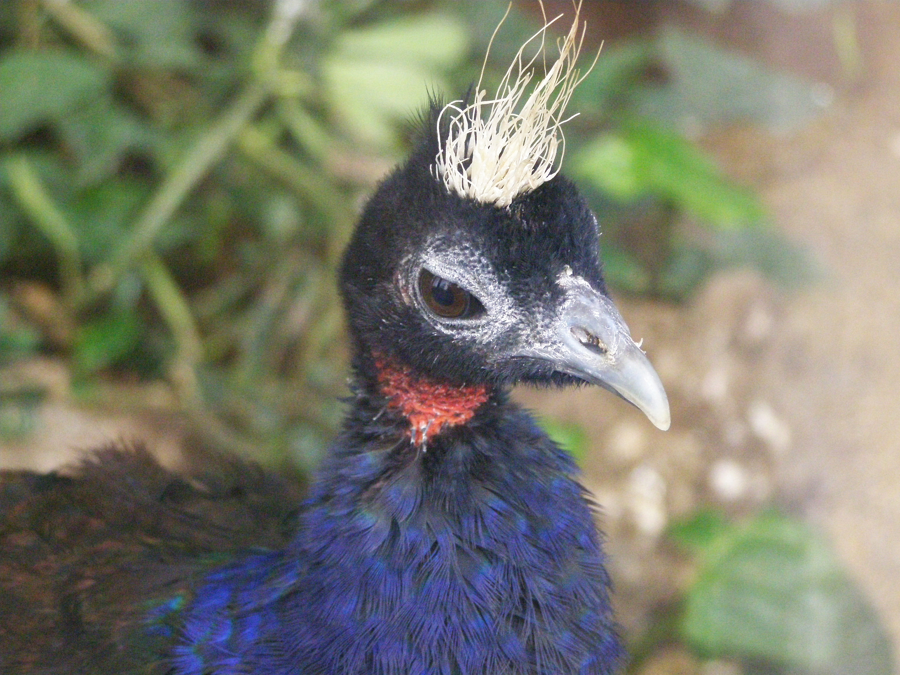 Congo Peafowl